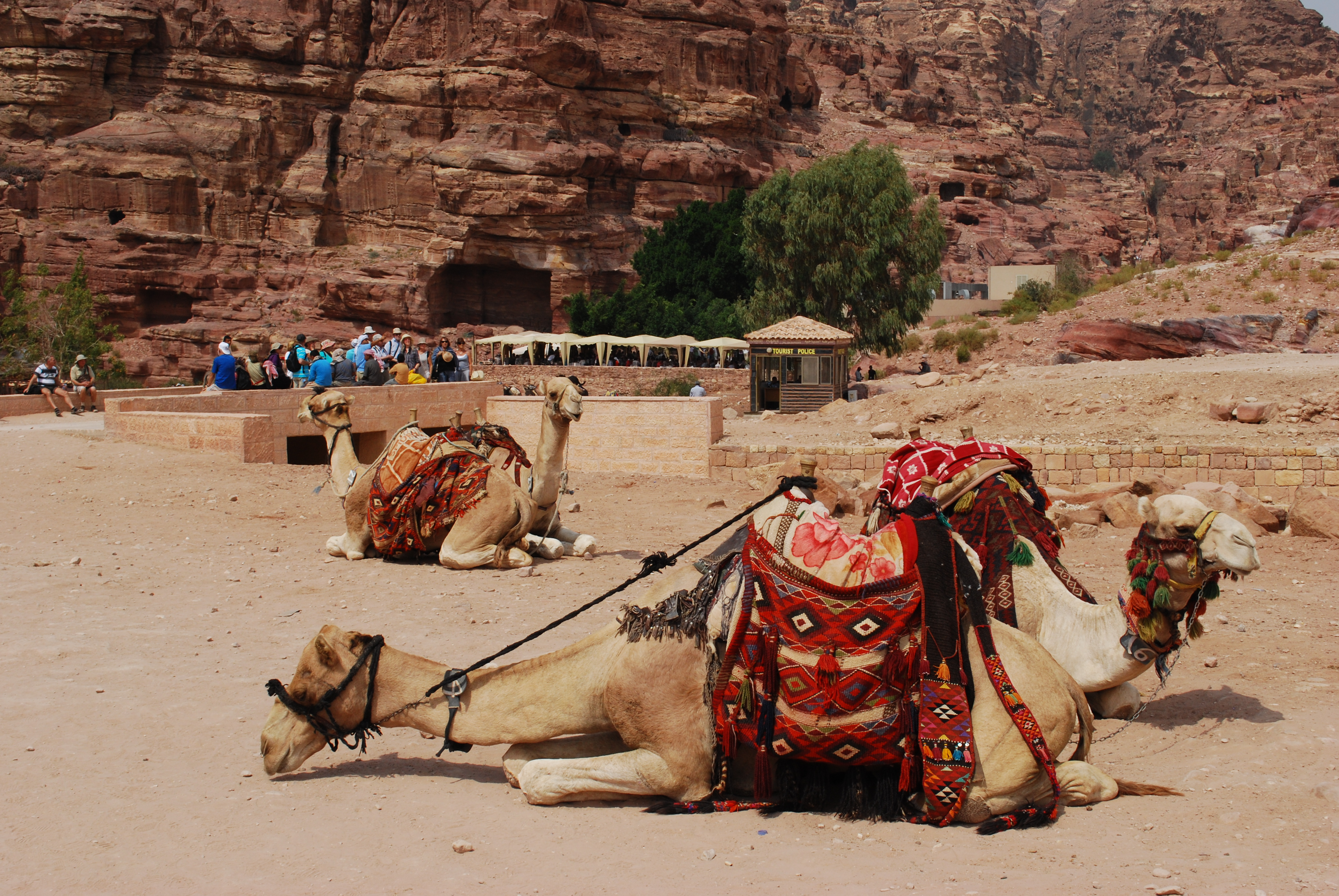 Dromadaires à proximité du Qasr al-Bint à Pétra ; à l'arrière-plan : pavillon de la police touristique et restaurant du site.